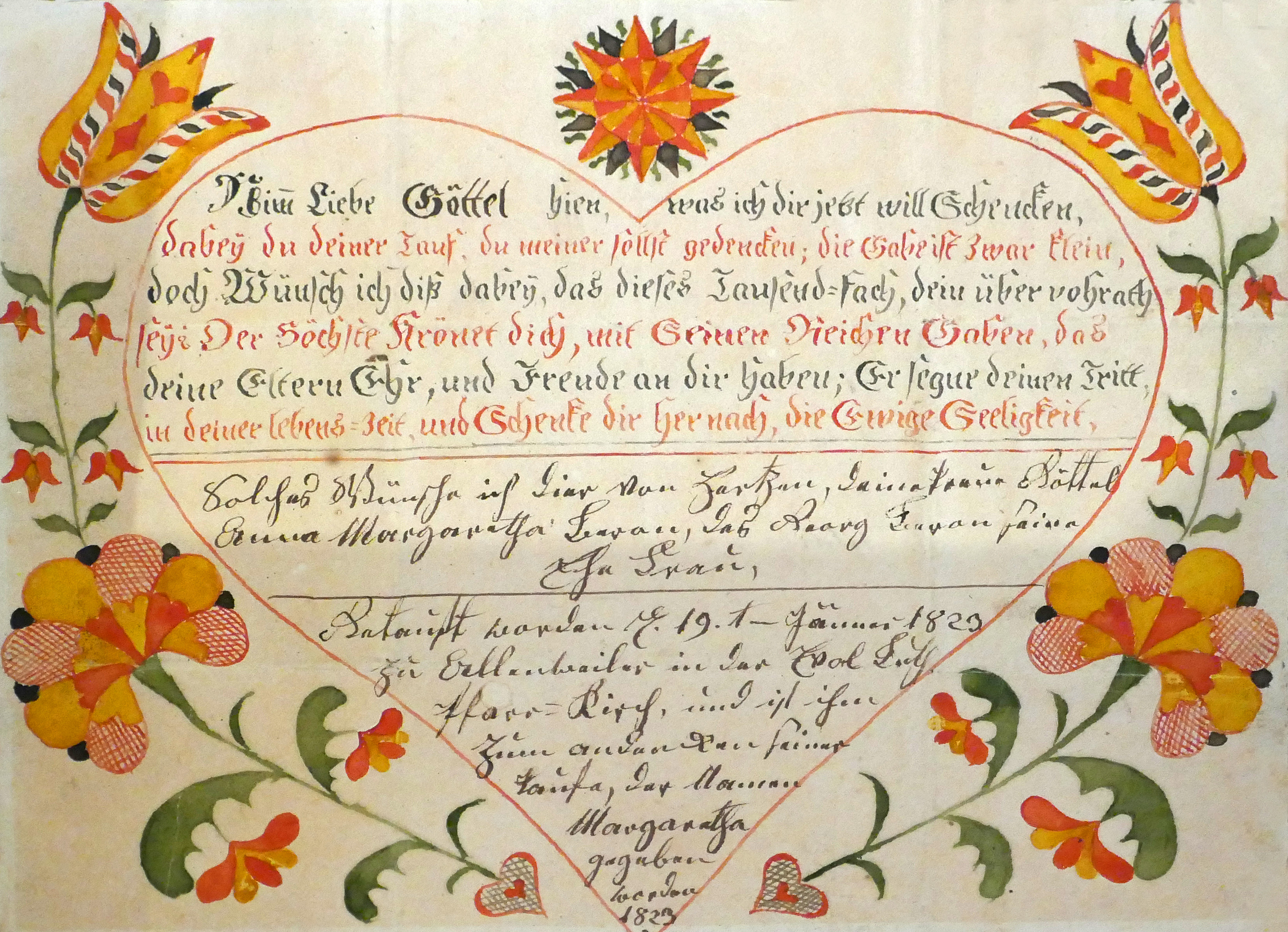 Lettre de baptême, Allenwiller, 1823. Exposition Vies protestantes : le mot et l'image au Musée alsacien de Strasbourg (2017).